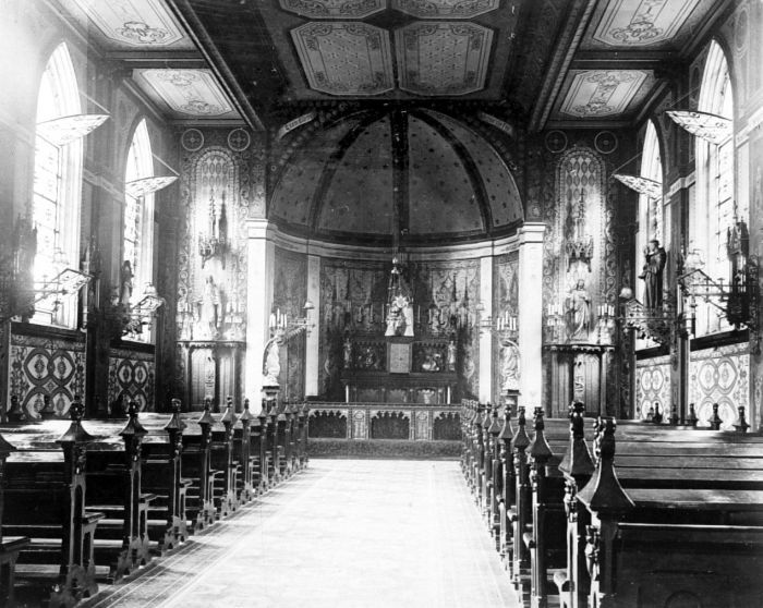 Repronegatief. Kapel van klooster, Noordwijk, Batavia